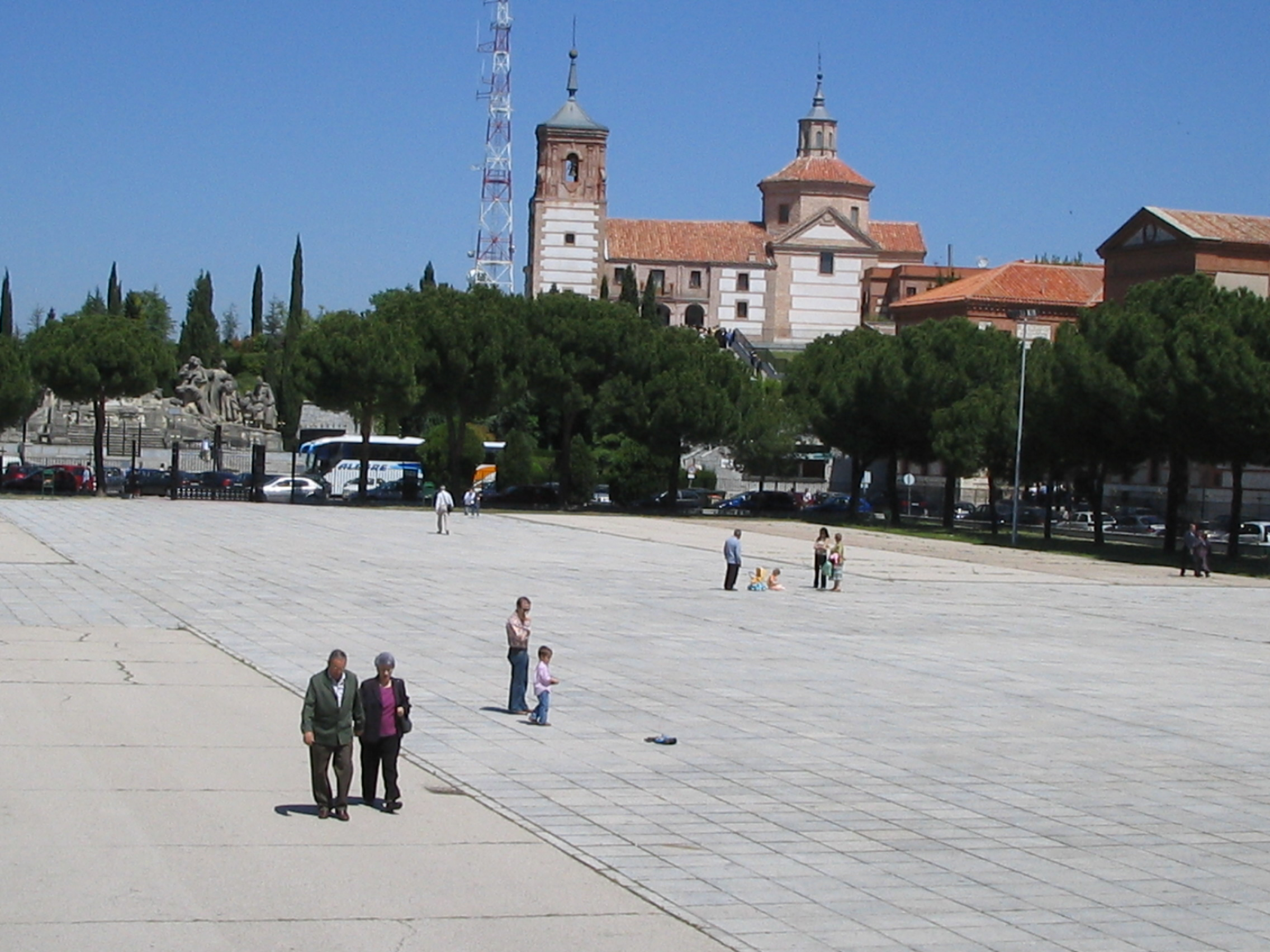 Iglesia en el Cerro de los Ángeles